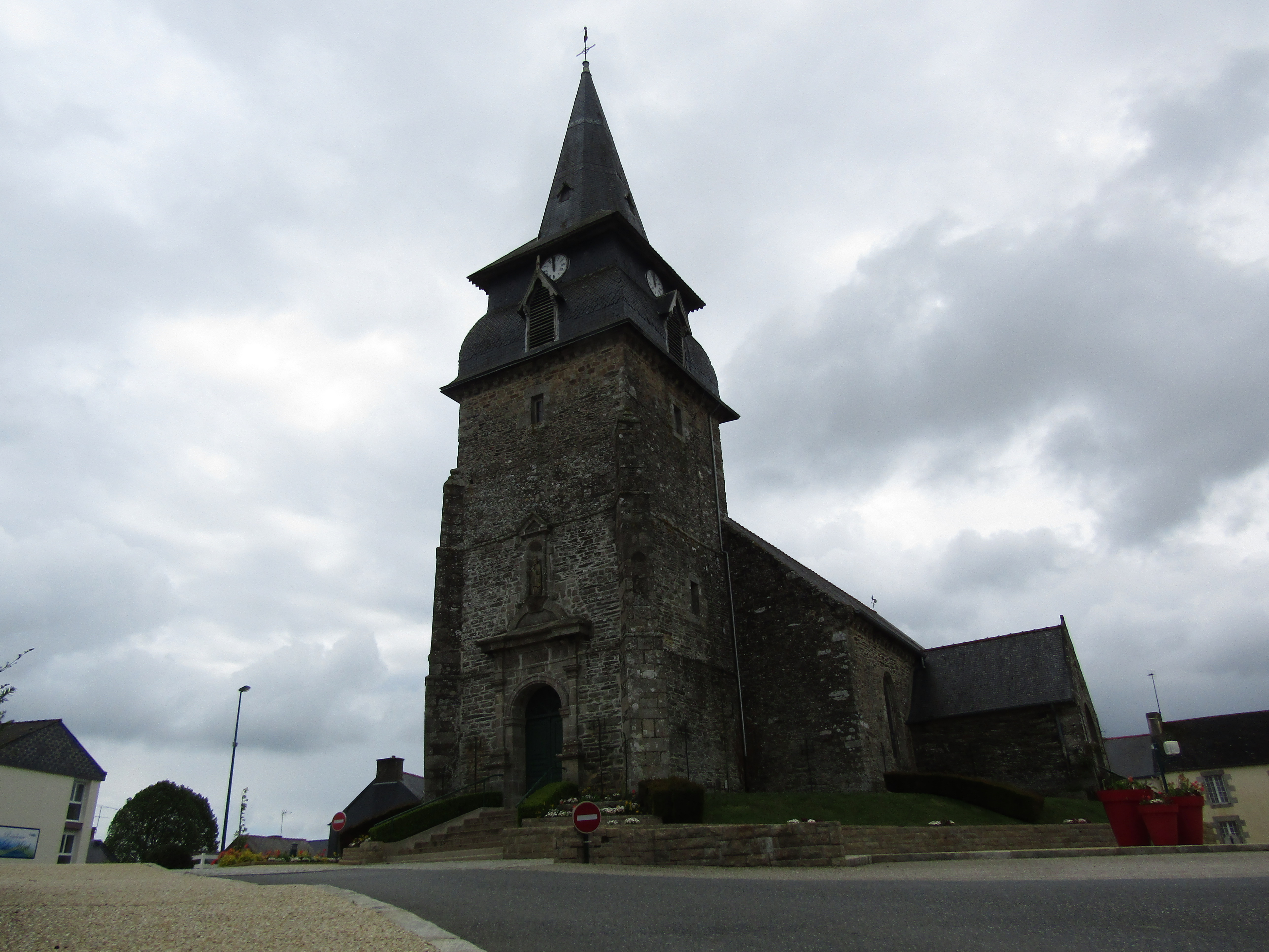 Église Saint-Pierre-et-Saint-Paul d'Allineuc en 2019